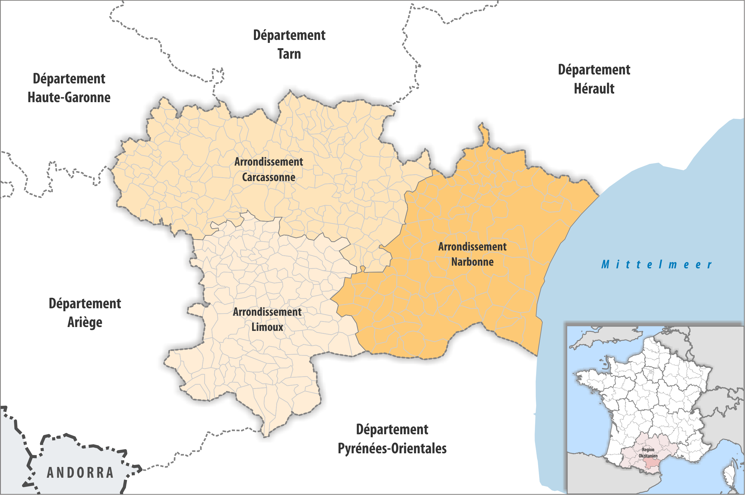 Gemeinden und Arrondissemente im Departement Aude